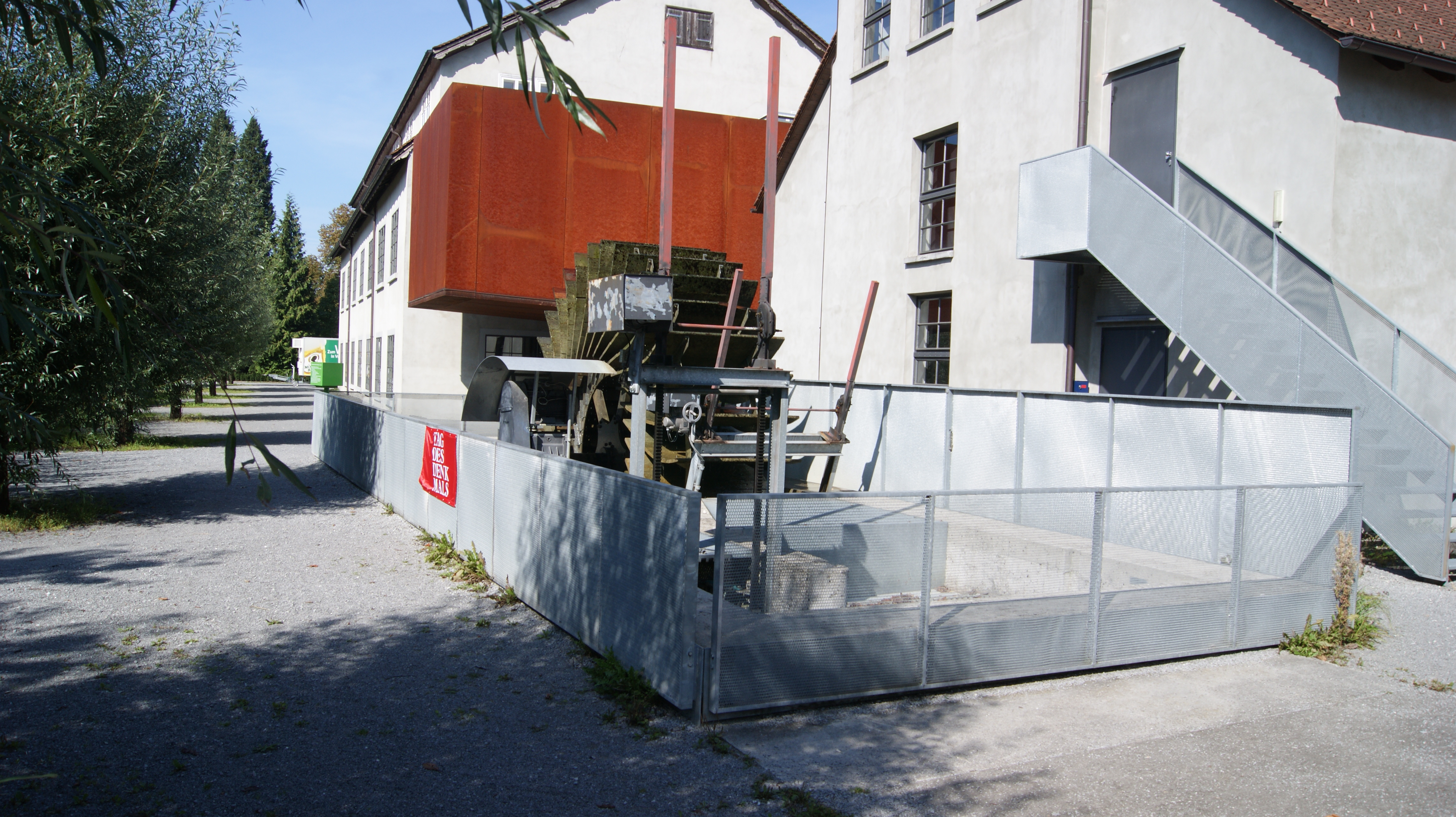 Kleinwasserkraftwerk Stadtgarten - Inatura, Dornbirn - Zuppinger-Rad.